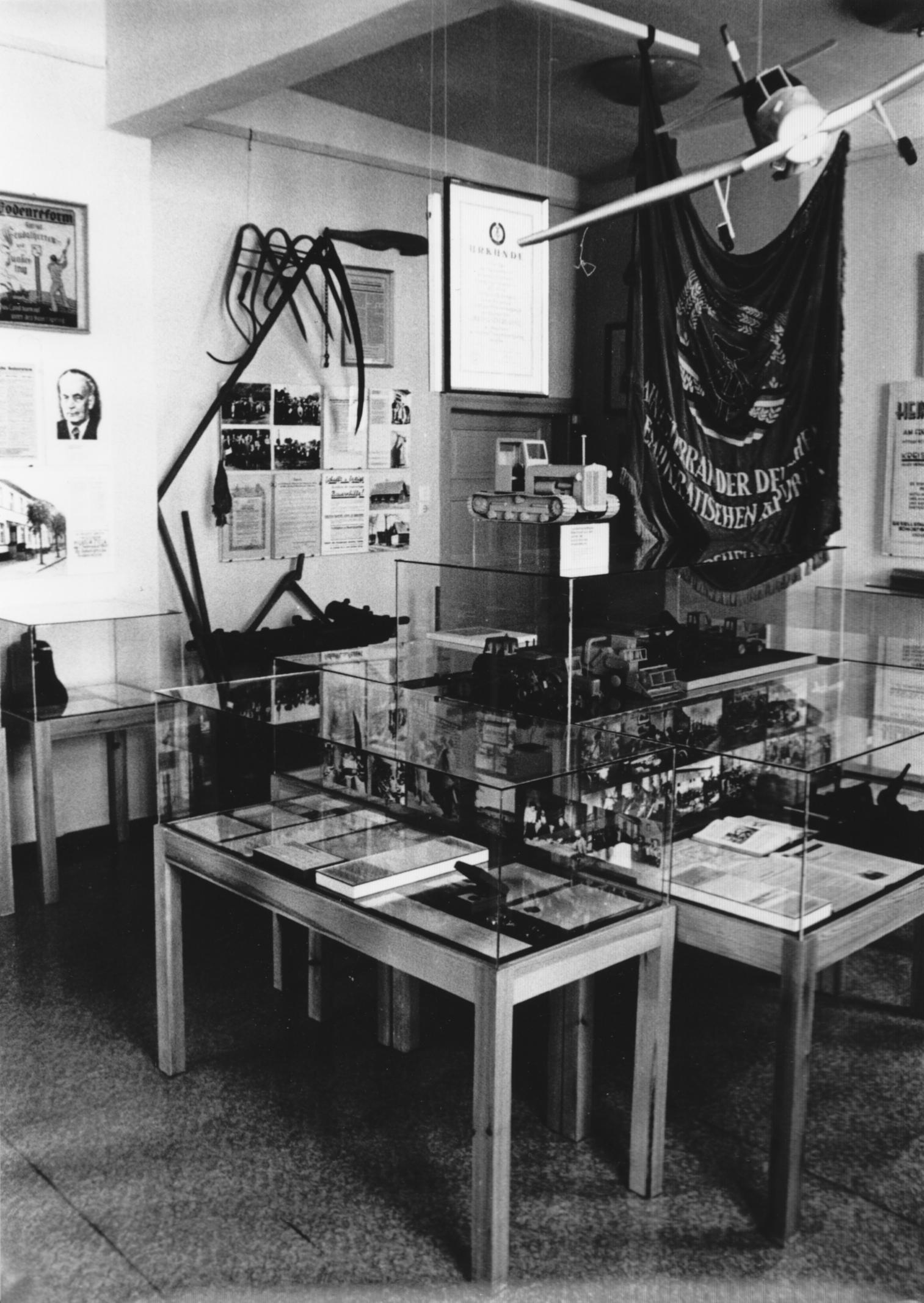 Kreisheimatmuseum Dauerausstellung 1983